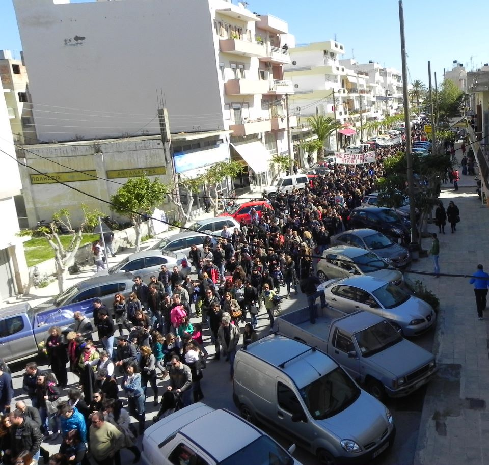 Με ένα μεγαλειώδες συλλαλητήριο, που προηγούμενο του δεν έχει γνωρίσει η Ιεράπετρα, ανταποκρίθηκαν χιλιάδες πολίτες , κάτοικοι και φοιτητές της πόλης, στο κάλεσμα της Ανοιχτής Επιτροπής Αγώνα για την υπεράσπιση του τόπου τους, της ζωής και της κοινωνίας. Στο συλλαλητήριο απαίτησαν να μη μεταφερθεί το ΤΕΙ Ιεράπετρας και να μην υποβαθμιστεί ή κλείσει το μοναδικό νοσοκομείο της περιοχής.